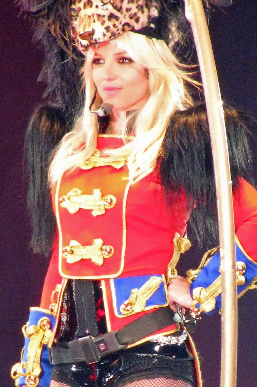 Cantando Circus en la Ciudad de Boston